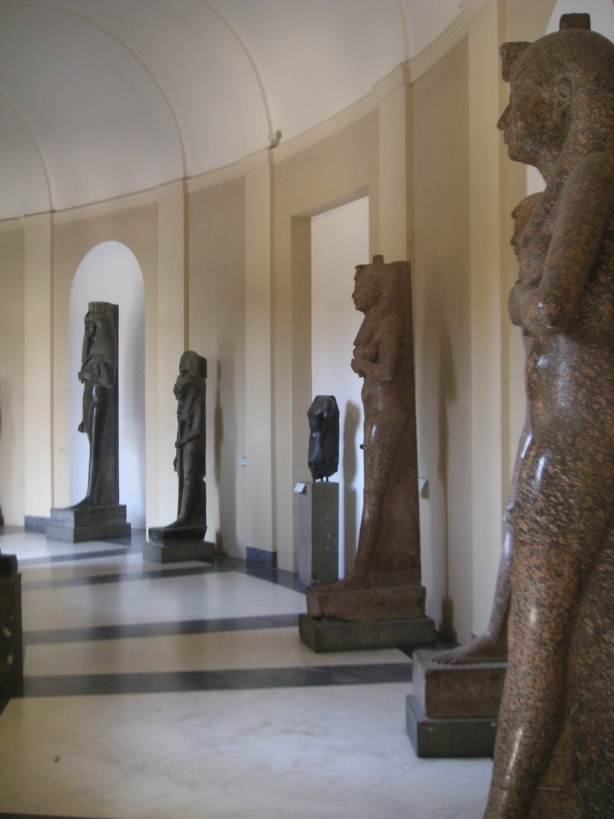 Statues colossales égyptiennes du Museo Gregoriano du Vatican à Rome